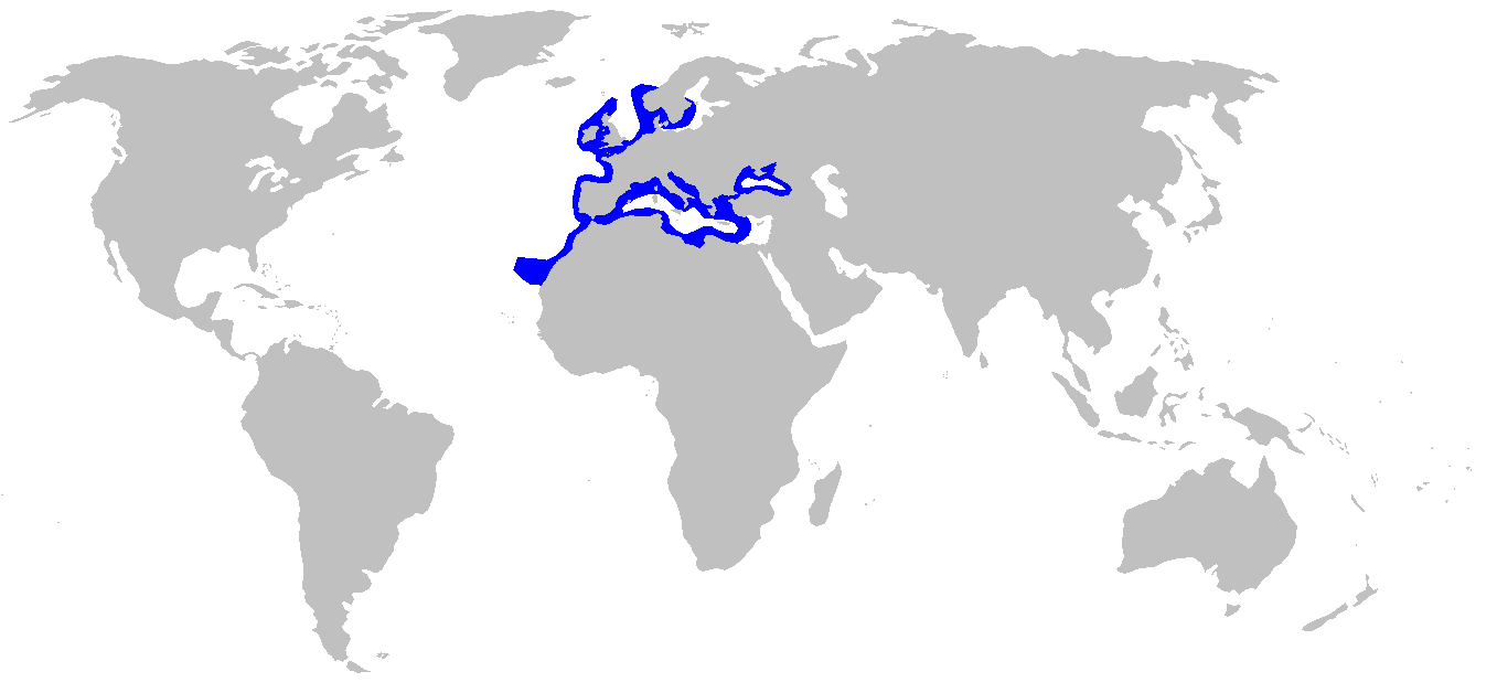 Distribution map for Squatina squatina